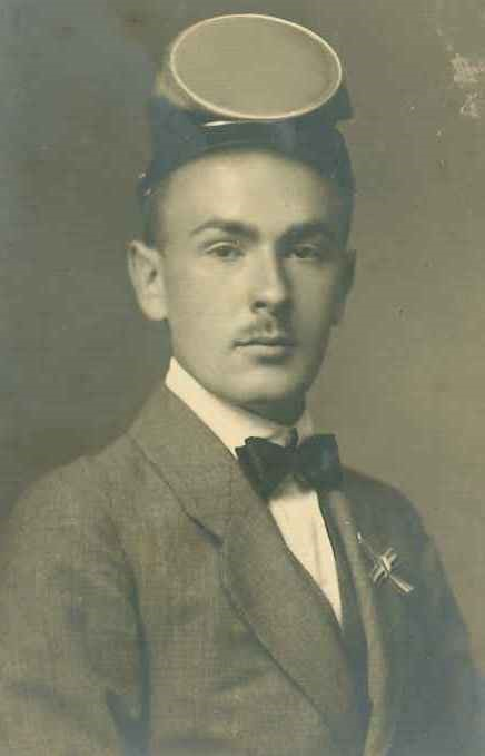 Porträtfotografie von Herbert Mumm von Schwarzenstein